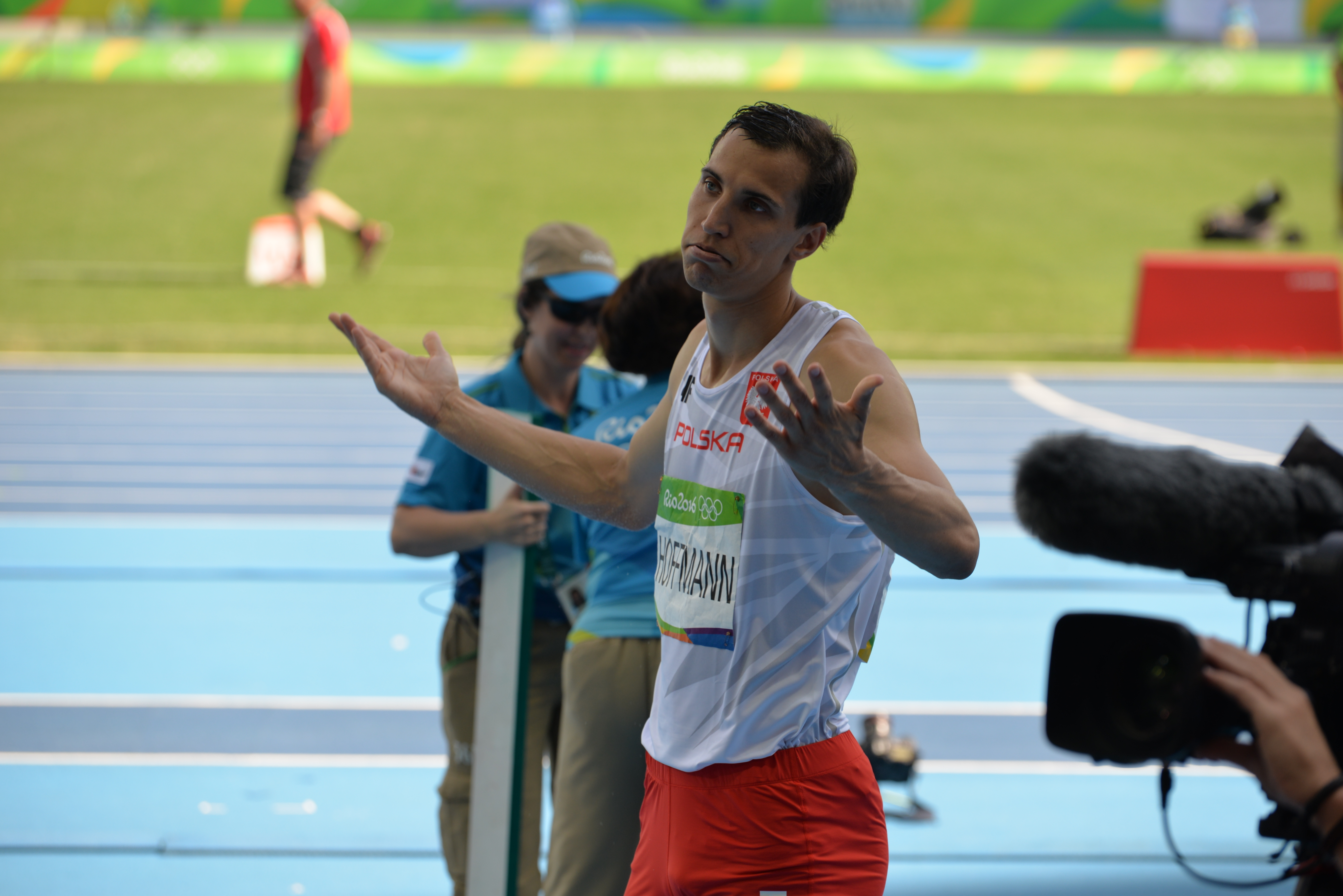 Finale du concours du triple saut à Rio 2016